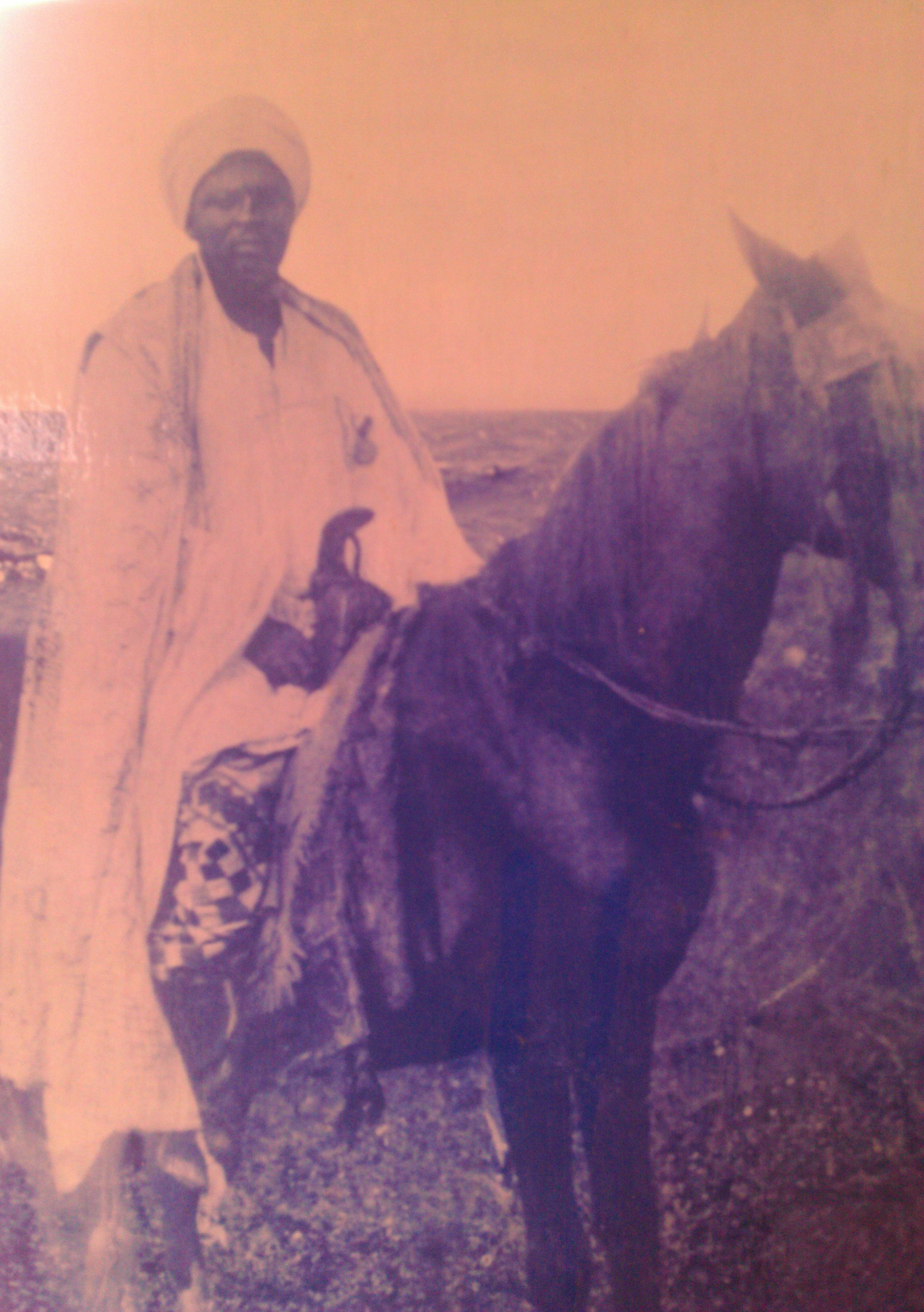 interprète bamoun/allemand/français en époque coloniale du Cameroun, il a gagné beaucoup d'influence sur administration du royaume Bamoun